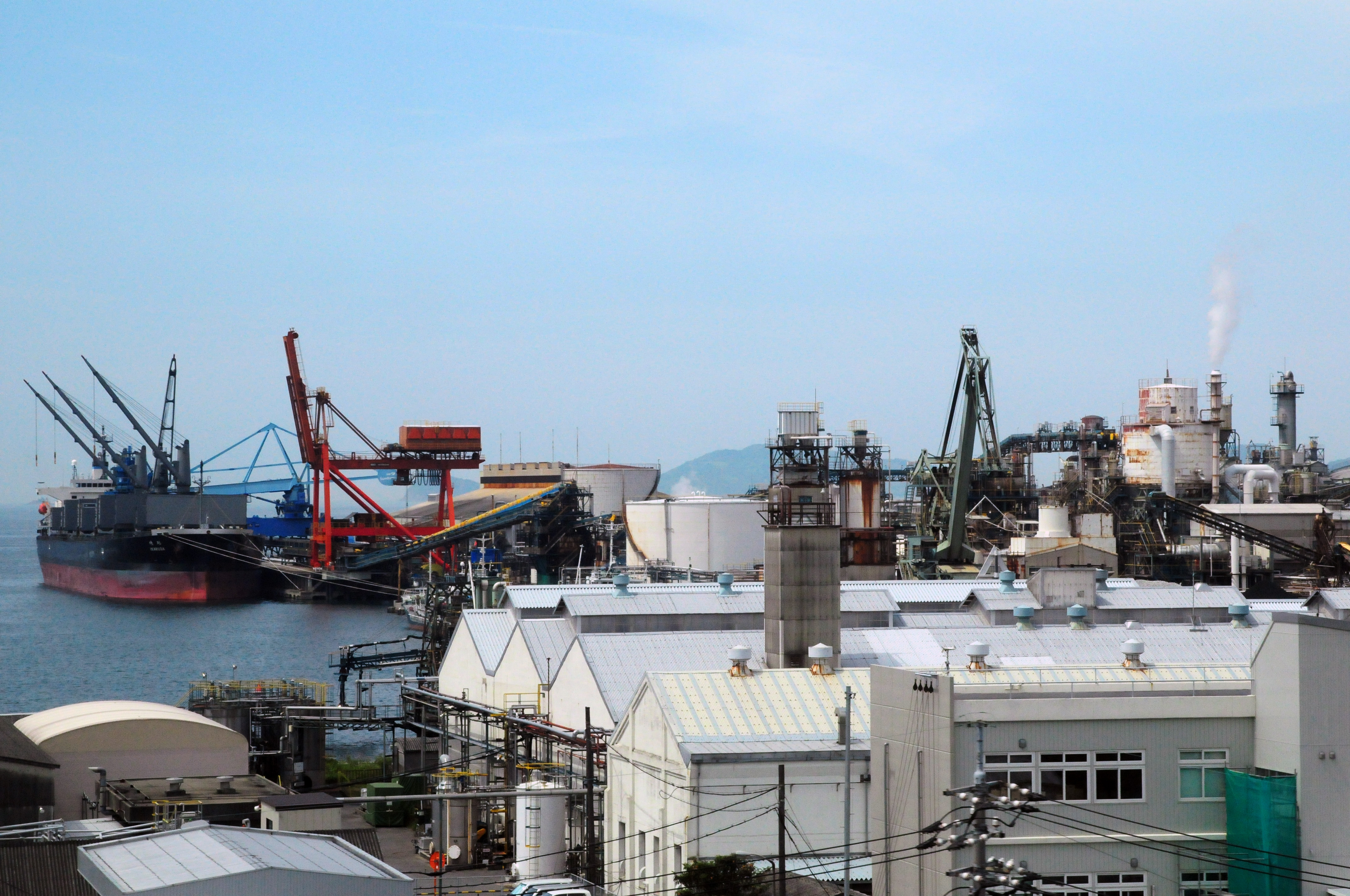 山陽新幹線の車窓から見た周南市御影町のトクヤマ徳山工場と専用岸壁。徳山駅の約1km北北西の位置から南南西の方向を見る。